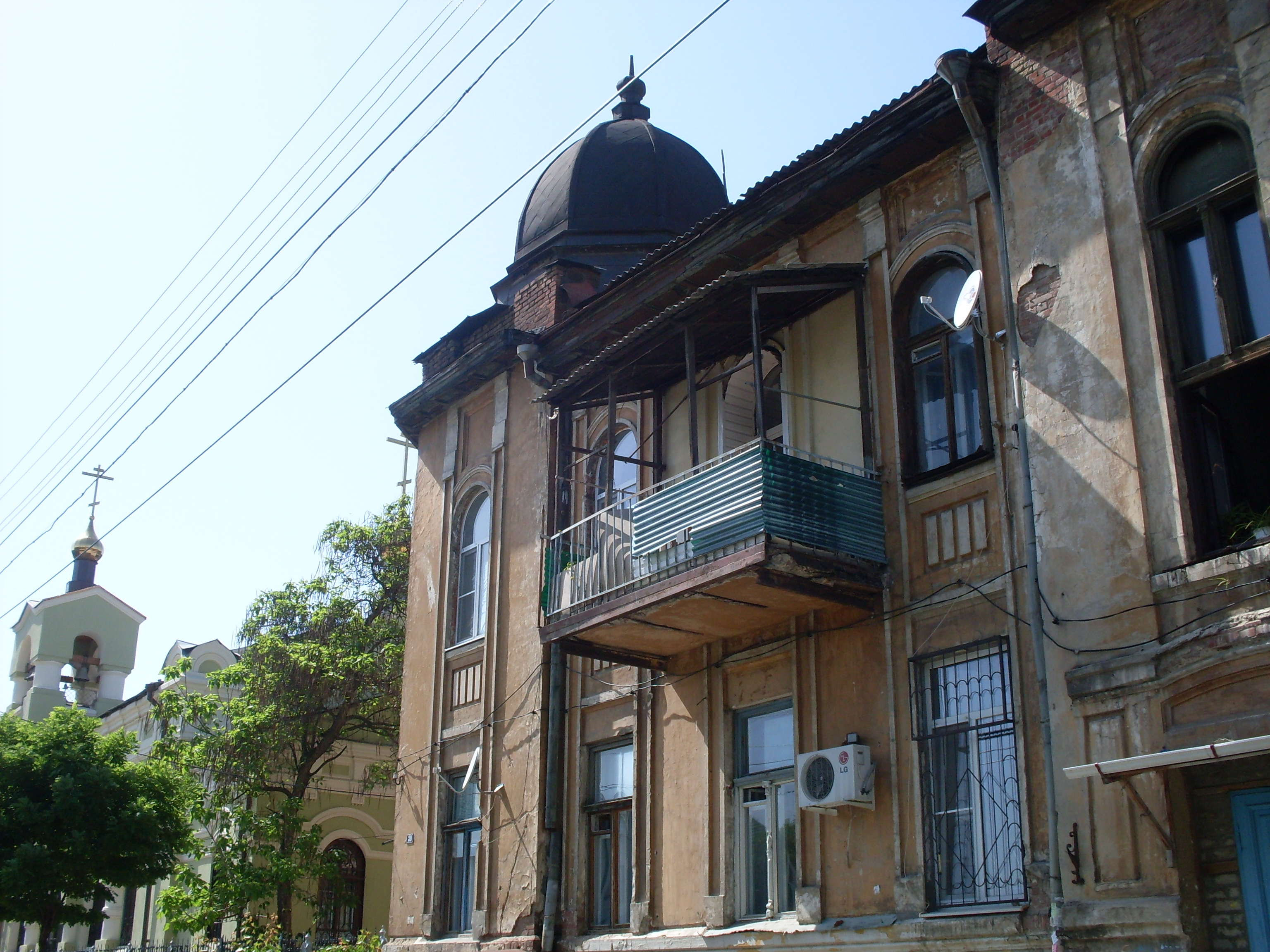 (Ростовская область, Ростов-на-Дону, ульяновская улица, 37)